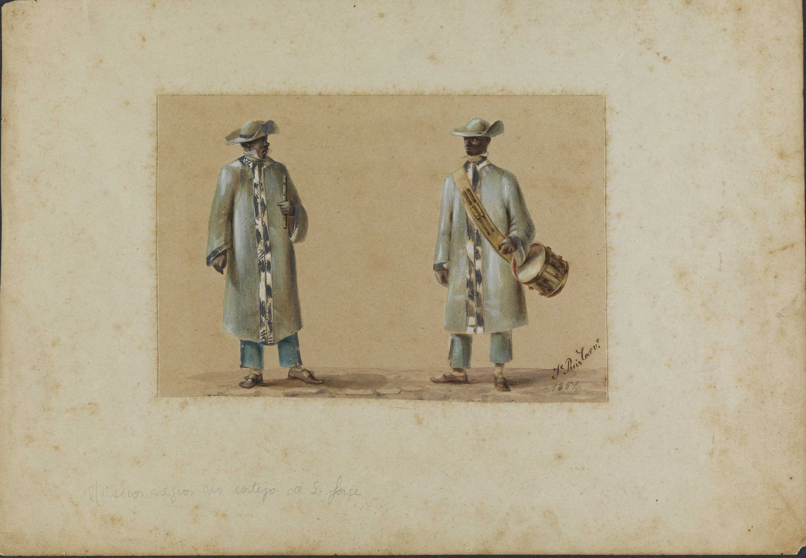 Autor/Criador José dos Reis Carvalho (desenhista), 1800-1872 Título Músicos negros no cortejo de São Jorge [Iconográfico] Imprenta [S.l.: s.n.], 1851.